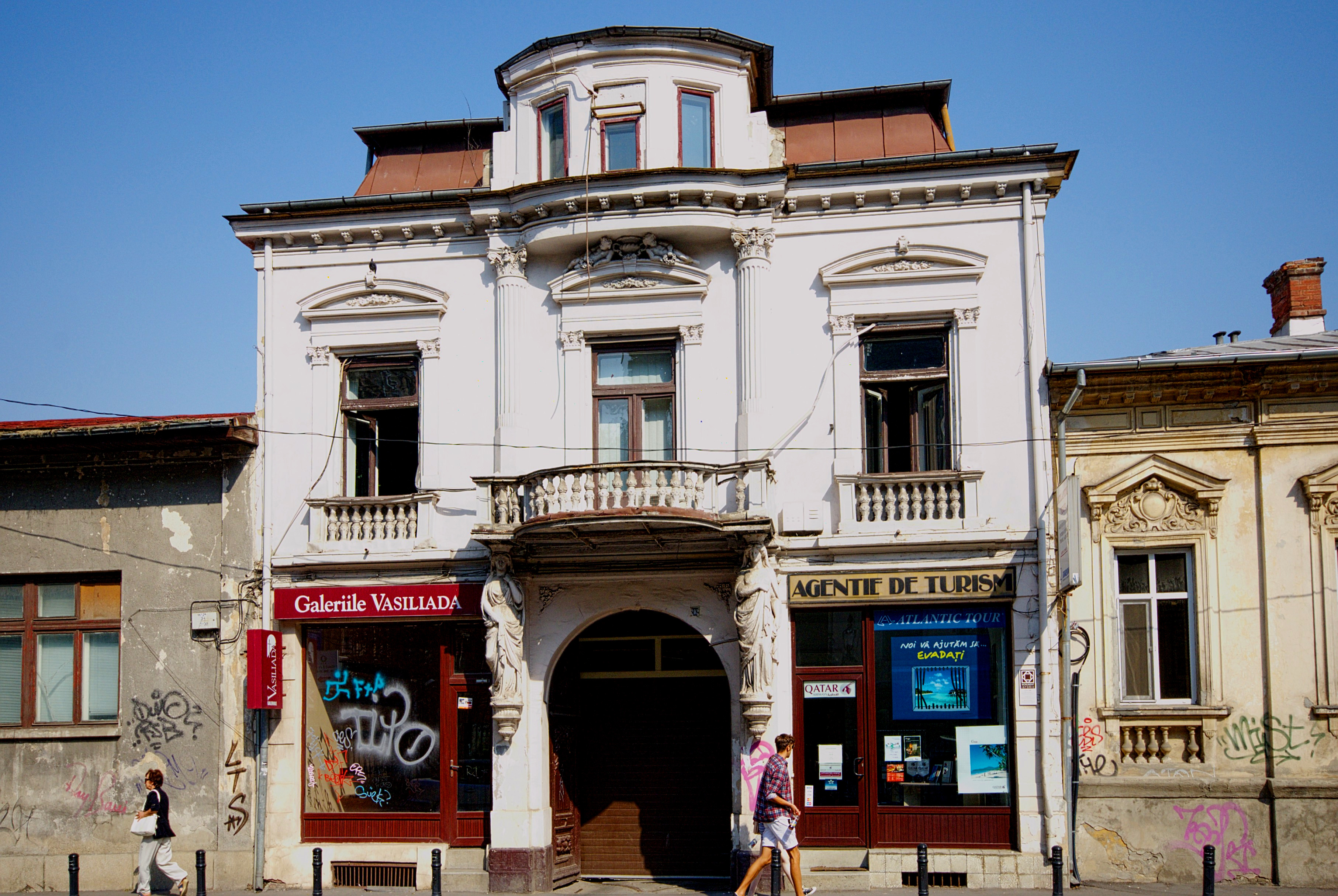 Casa cu cariatide, Calea Victoriei 202